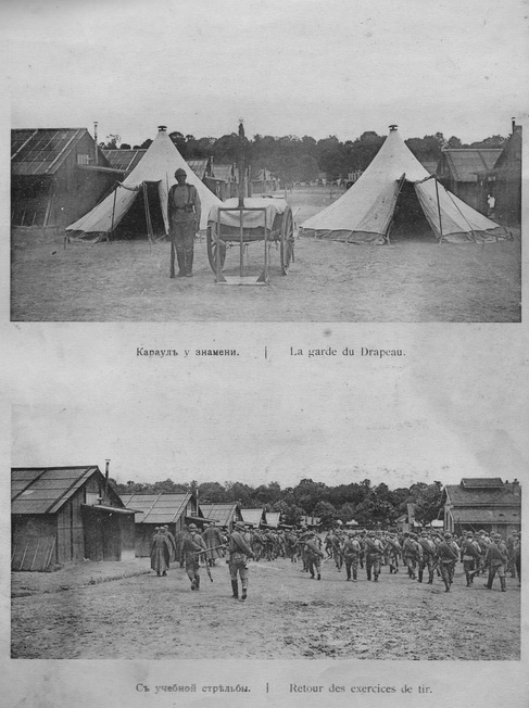 Русский экспедиционный корпус. Фотоальбом. Описание - на фотографии